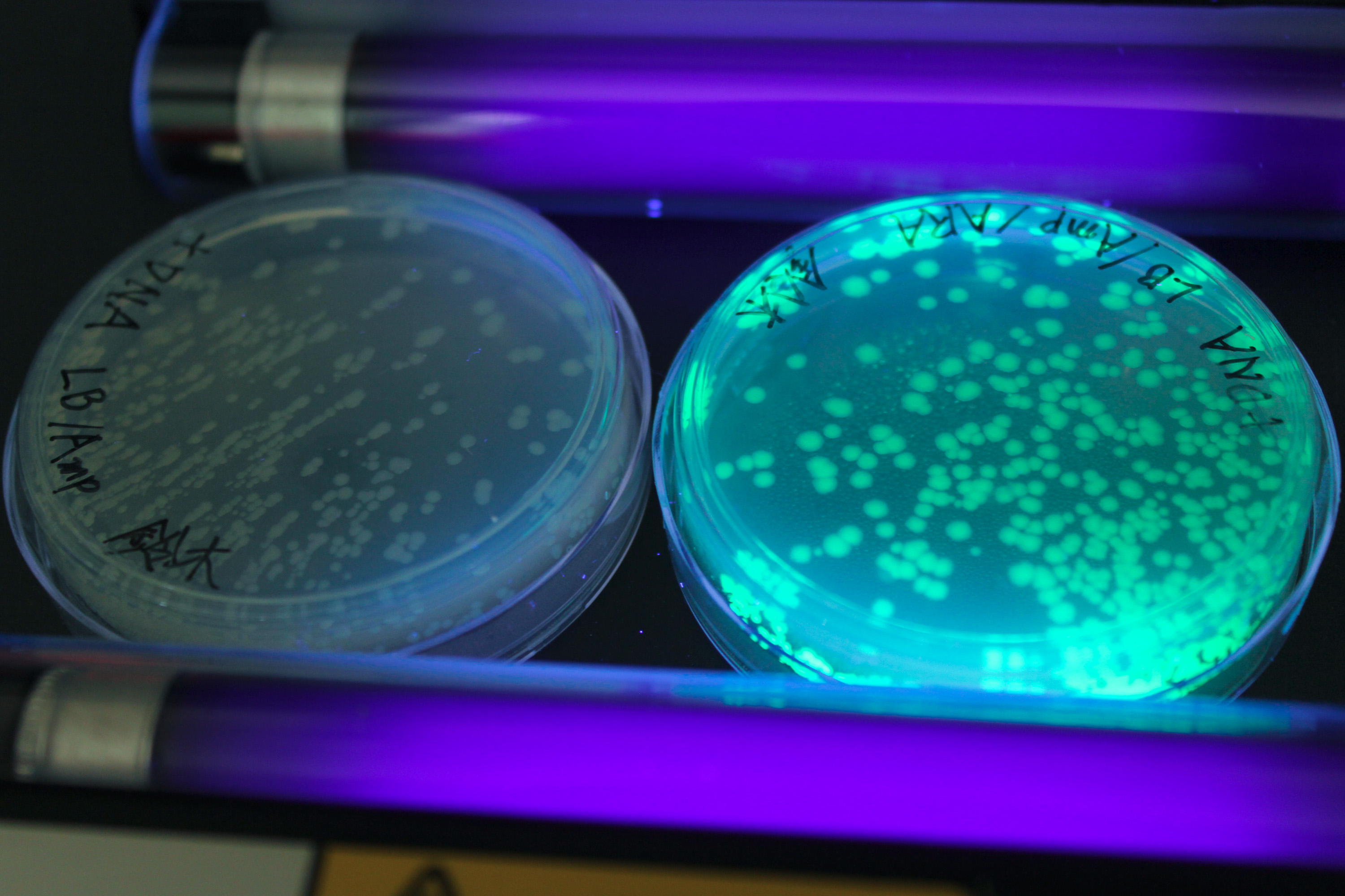 紫外線下において蛍光を発するGFP遺伝子を導入した遺伝子組換大腸菌（右）とGFPの発現が抑制された遺伝子組換大腸菌（左）